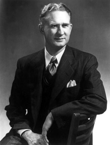 Portrait of Walter H. Zinn.